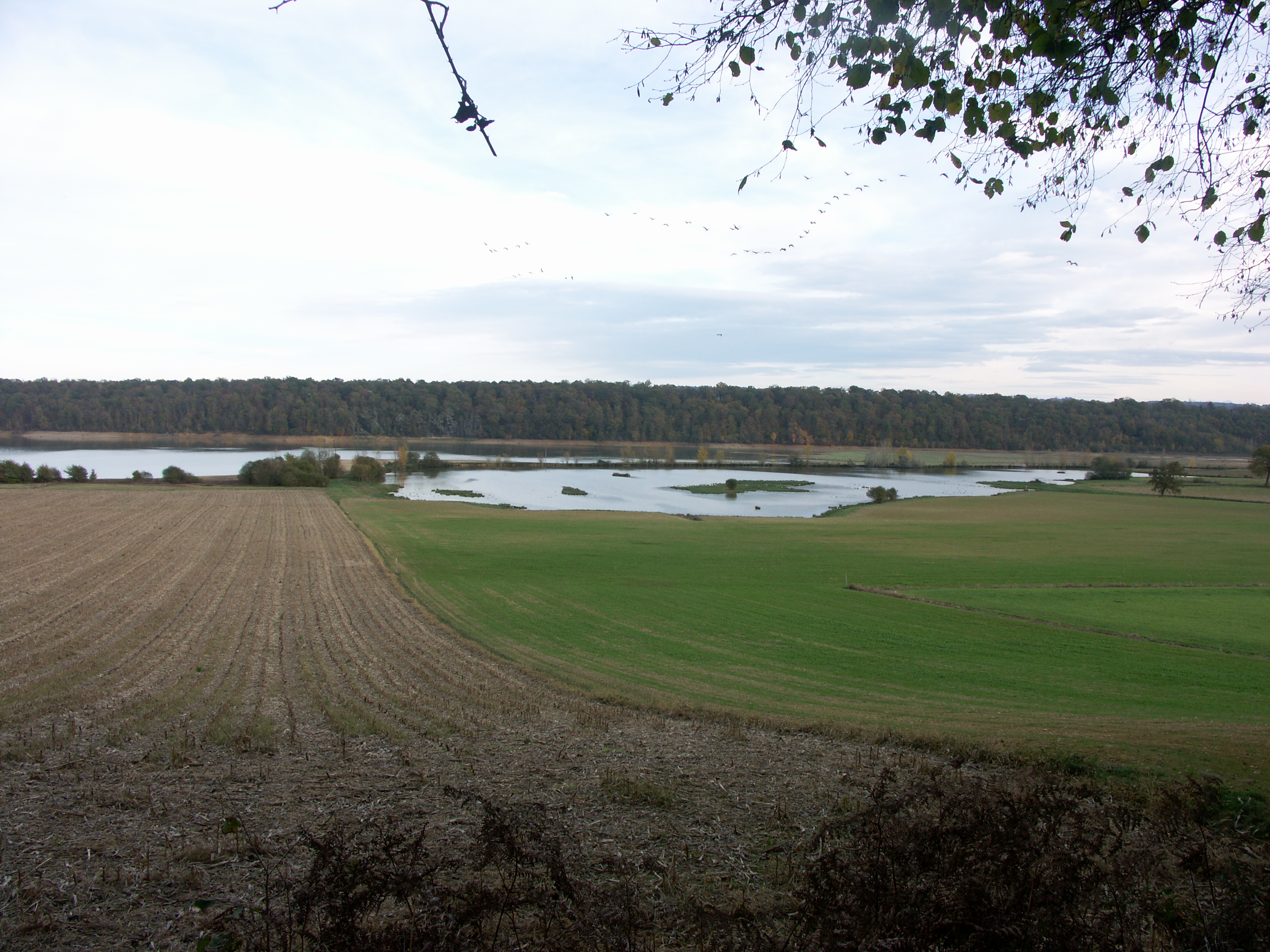 Le lac de Puydarrieux, Hautes-Pyrénées